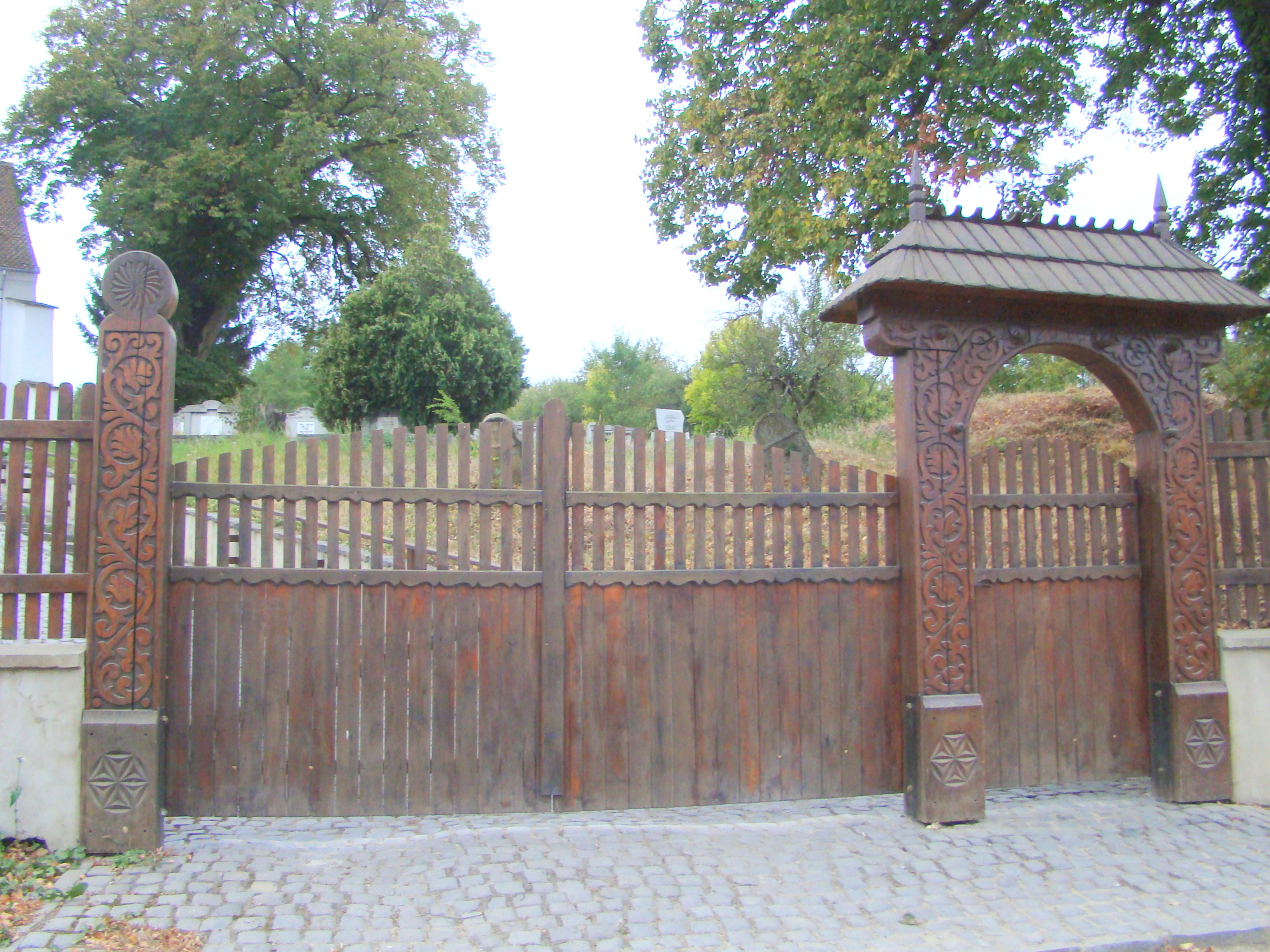 Biserica reformată, sat Pădureni; comuna Moacșa f.n. sec. XV, transf. sec. XIX